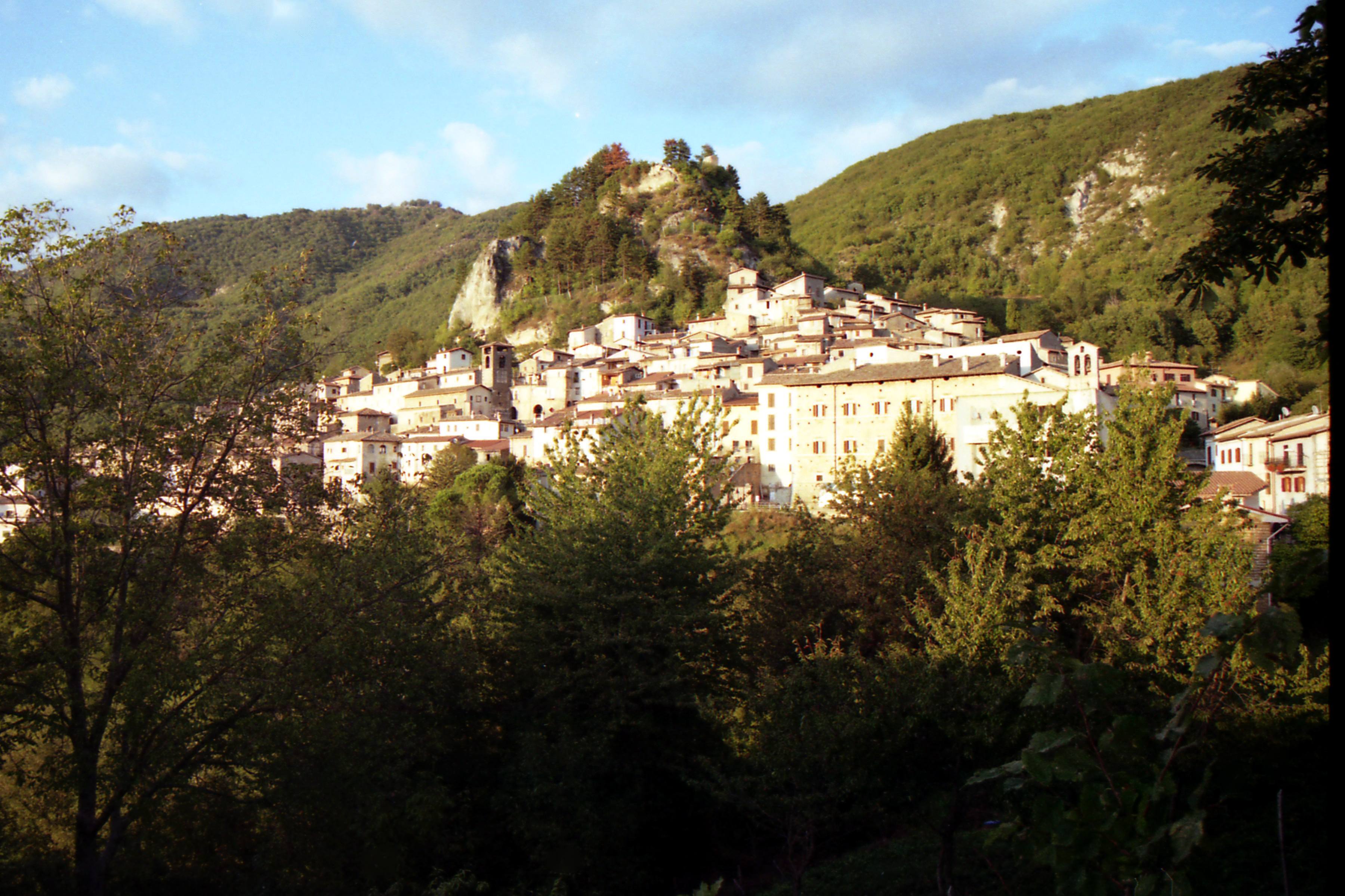 Vista d'insieme dell'abitato di Petrella Salto, con la rocca dei Cenci e Palazzo Maoli